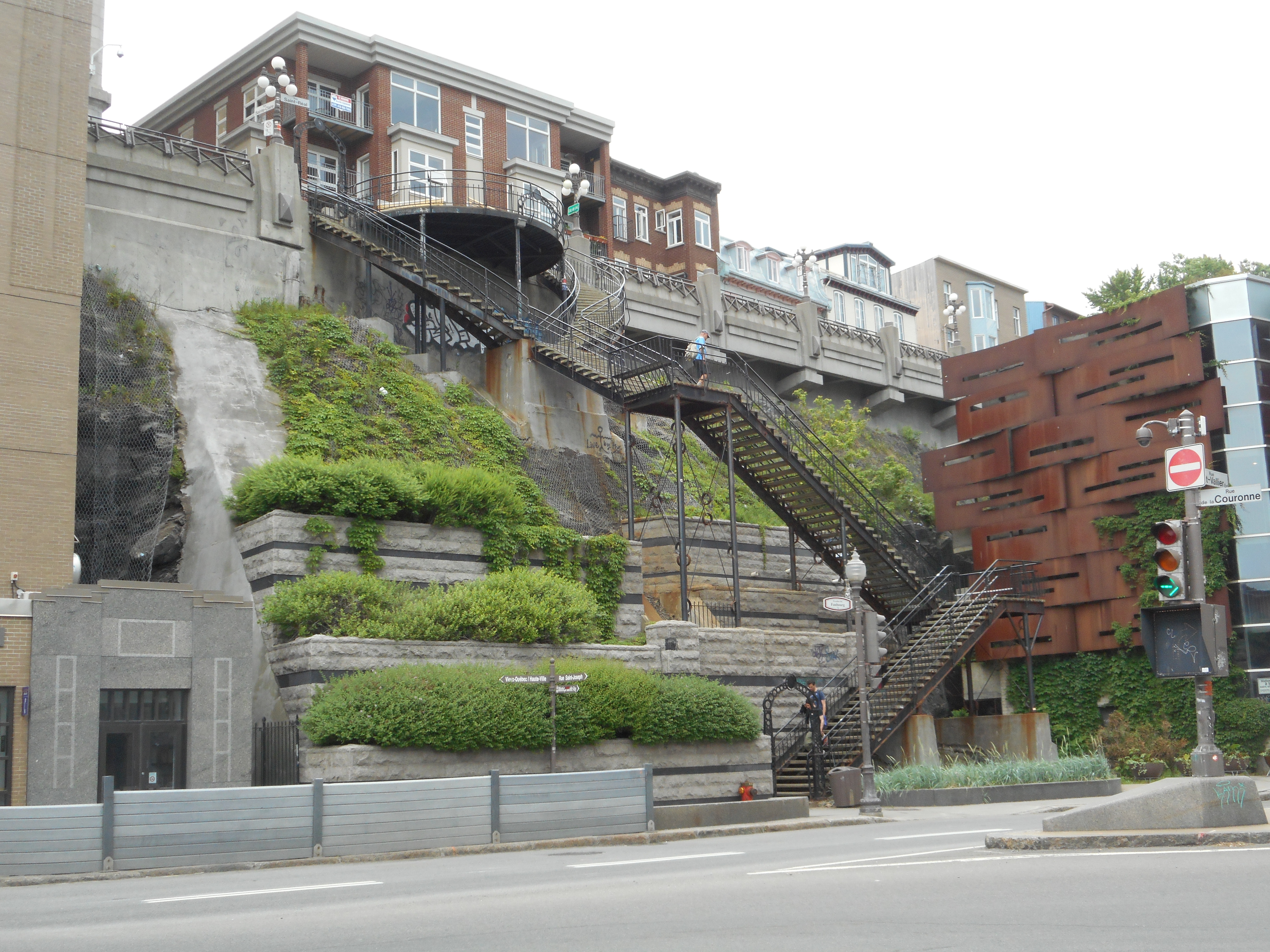 Escalier du Faubourg, Québec Vue d'en bas, rue De Saint-Vallier Est